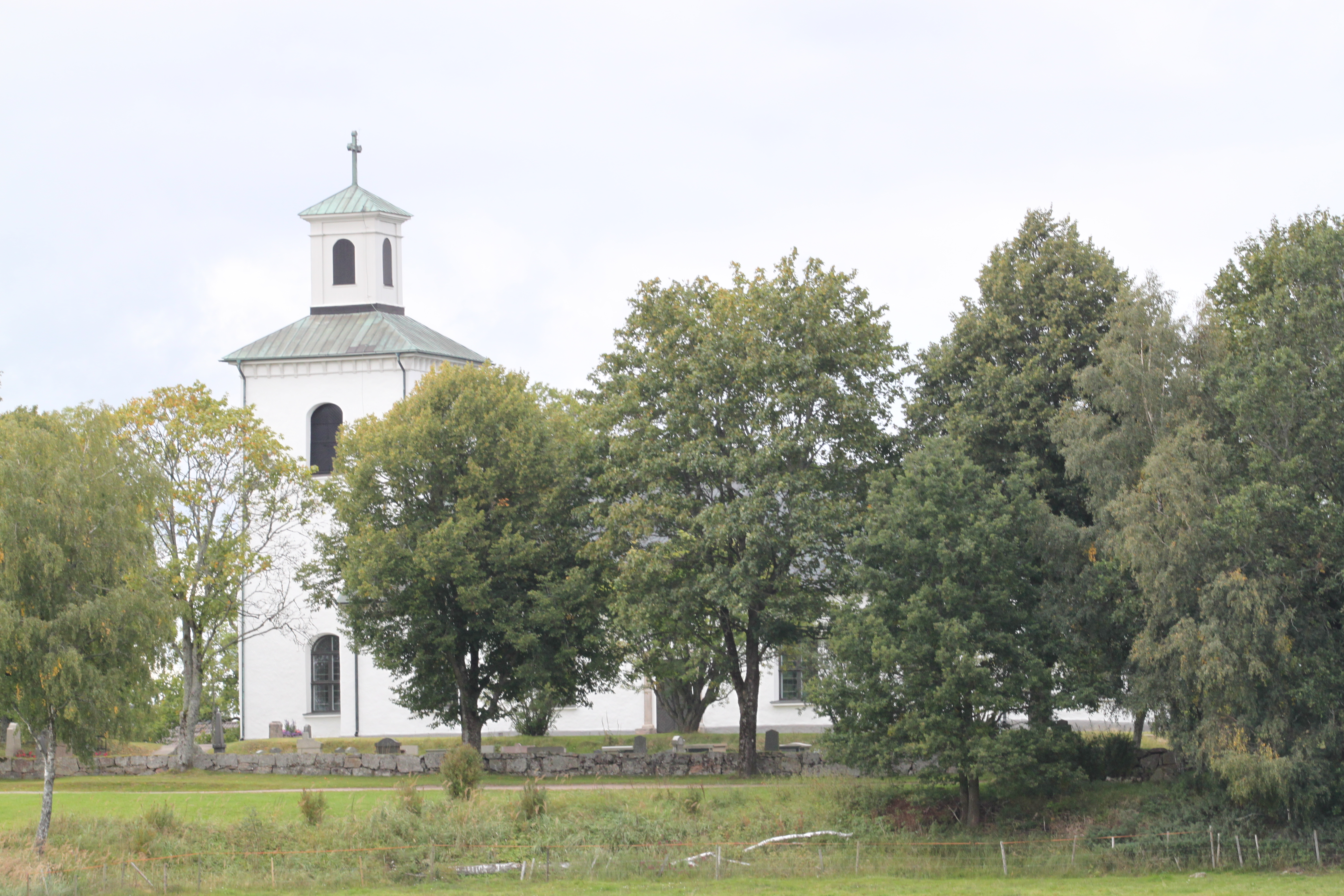 Annerstads kyrka